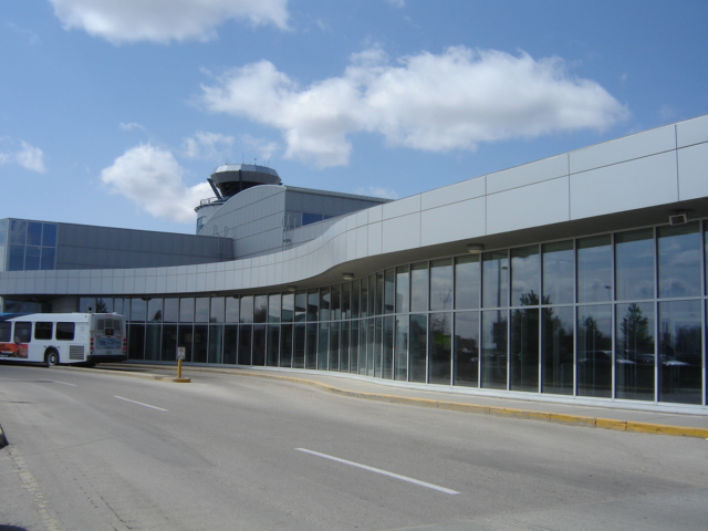 Saskatoon John G. Diefenbaker International Airport